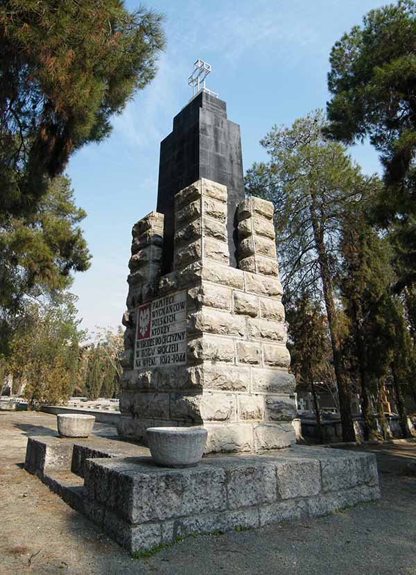 یادمان کشته شدگان و مهاجران لهستانی به ایران و تهران